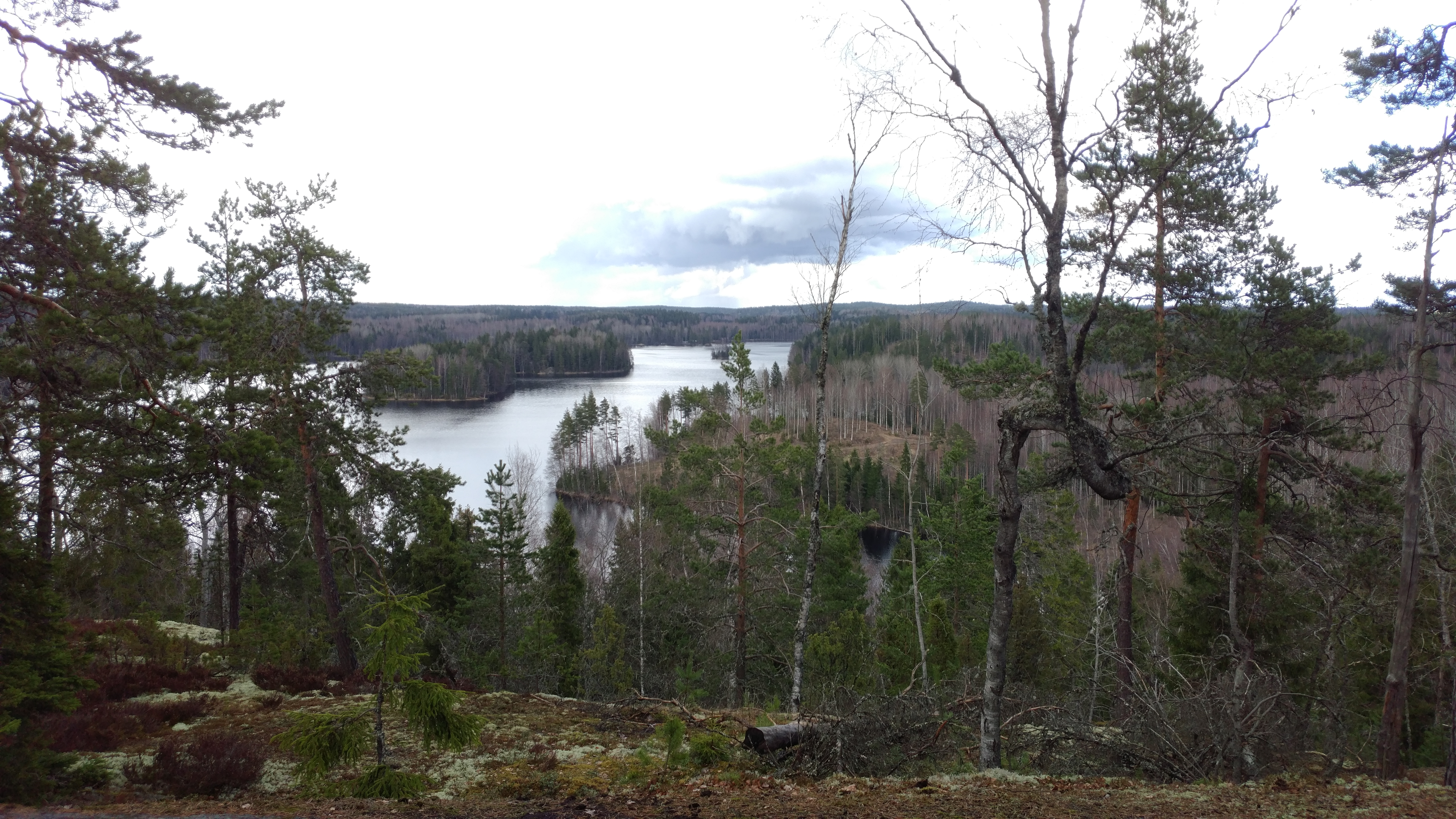 Näköala Konianvuoren koillisrinteeltä Moksjärvelle Vihdin Moksissa.